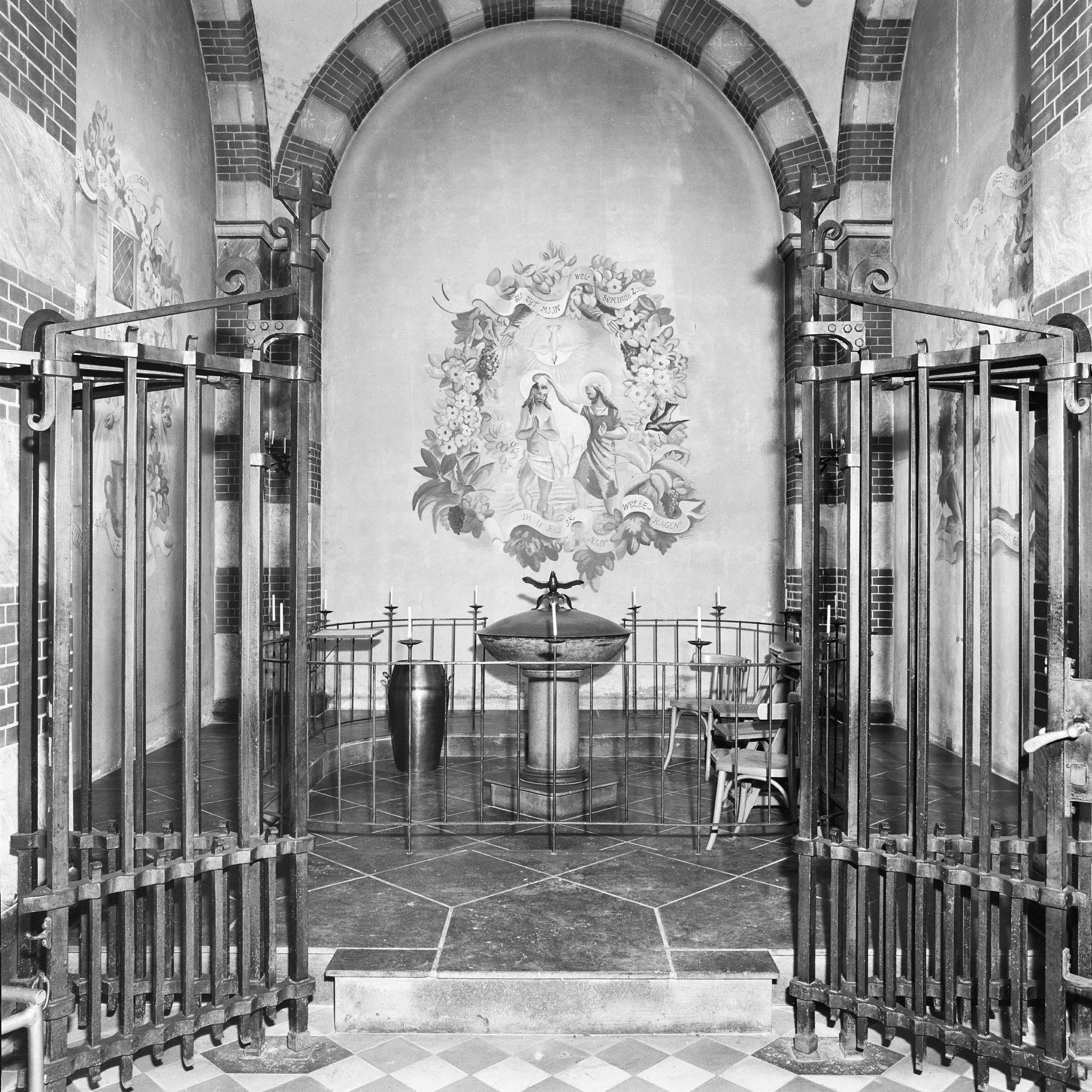 R.K. O.L.Vr.Kerk: interieur doopkapel voorzijde, doopvont en schildering Piet Worm